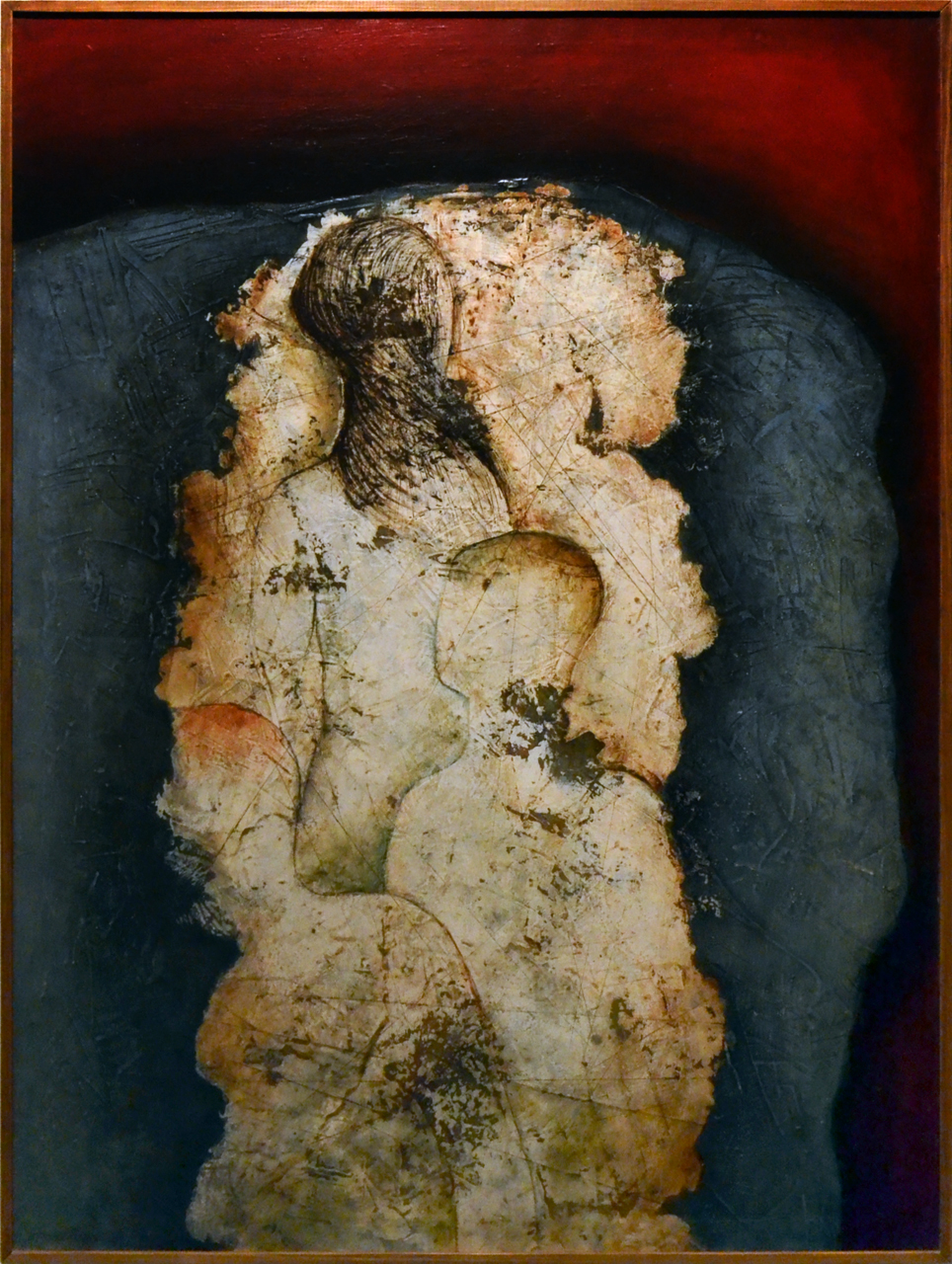 Stanislav Podhrázský, Uzel (1964), olej, Galerie umění Karlovy Vary